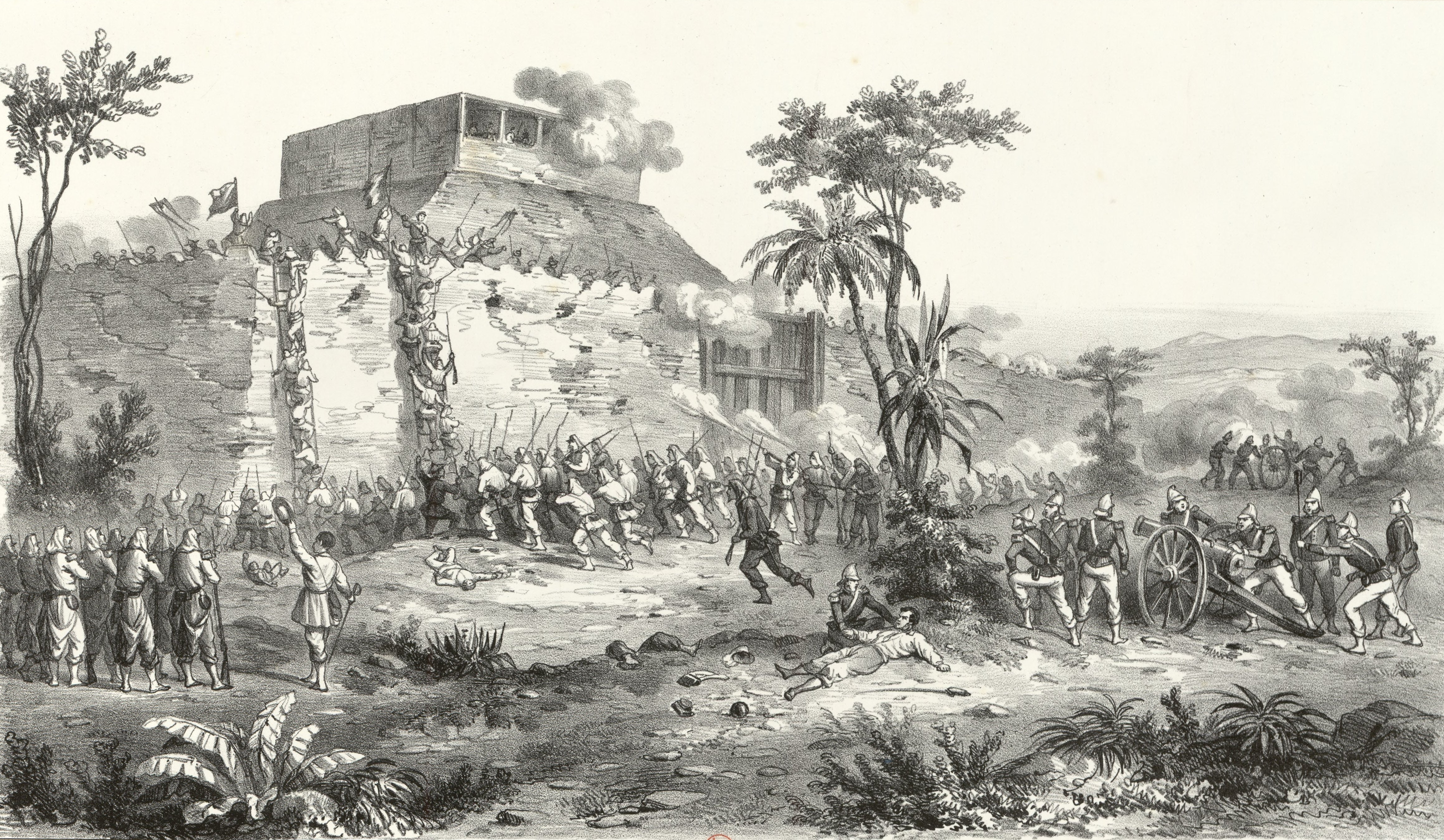 Estampe représentant la prise des forts du Peï-Ho, le 21 août 1860.